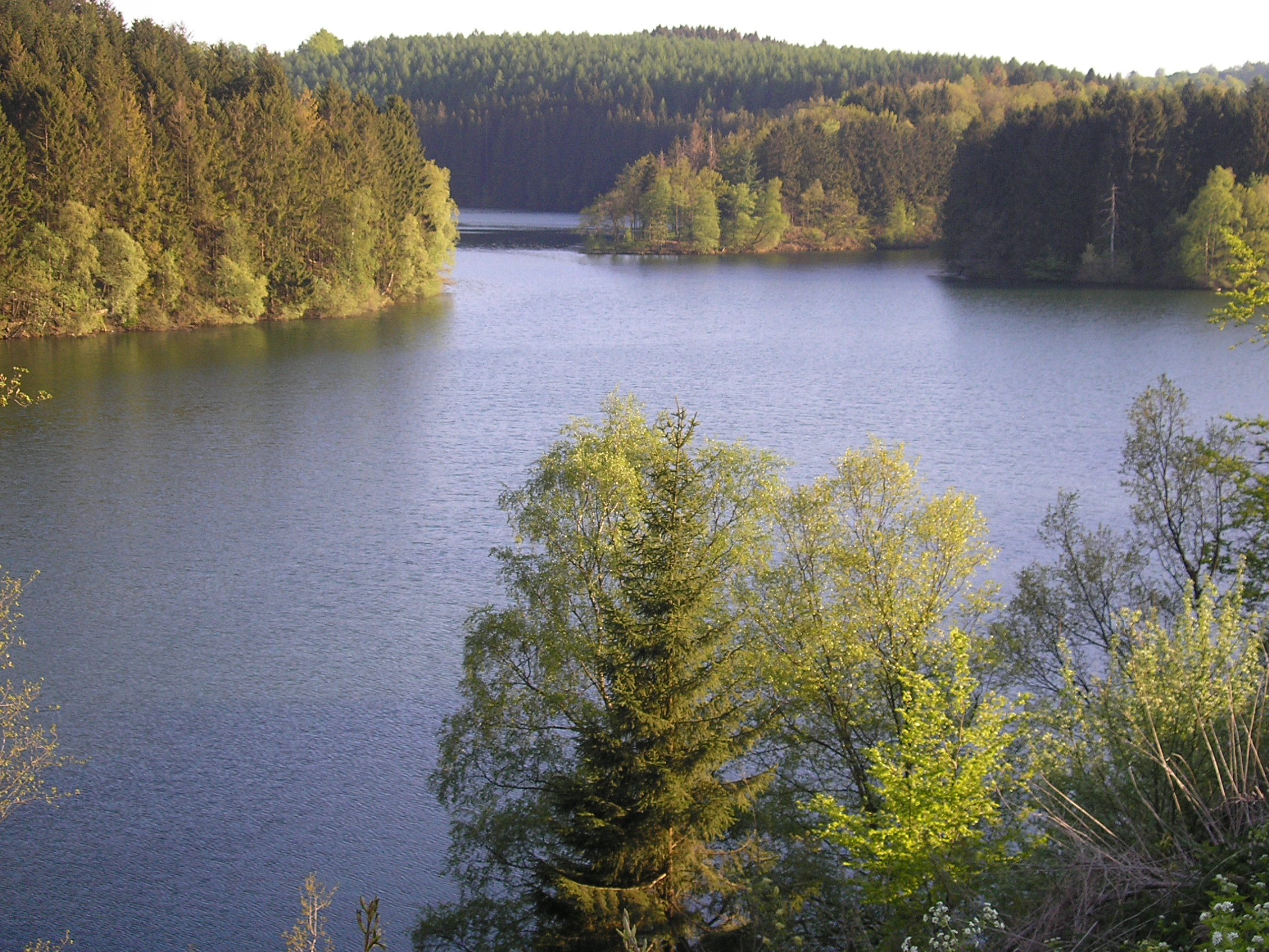 Lac de Robertville, Waimes, East Belgium